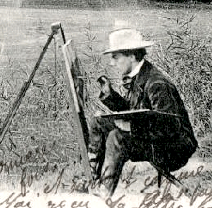 The Artist, 1903, Villeneuve l'Etang, detail